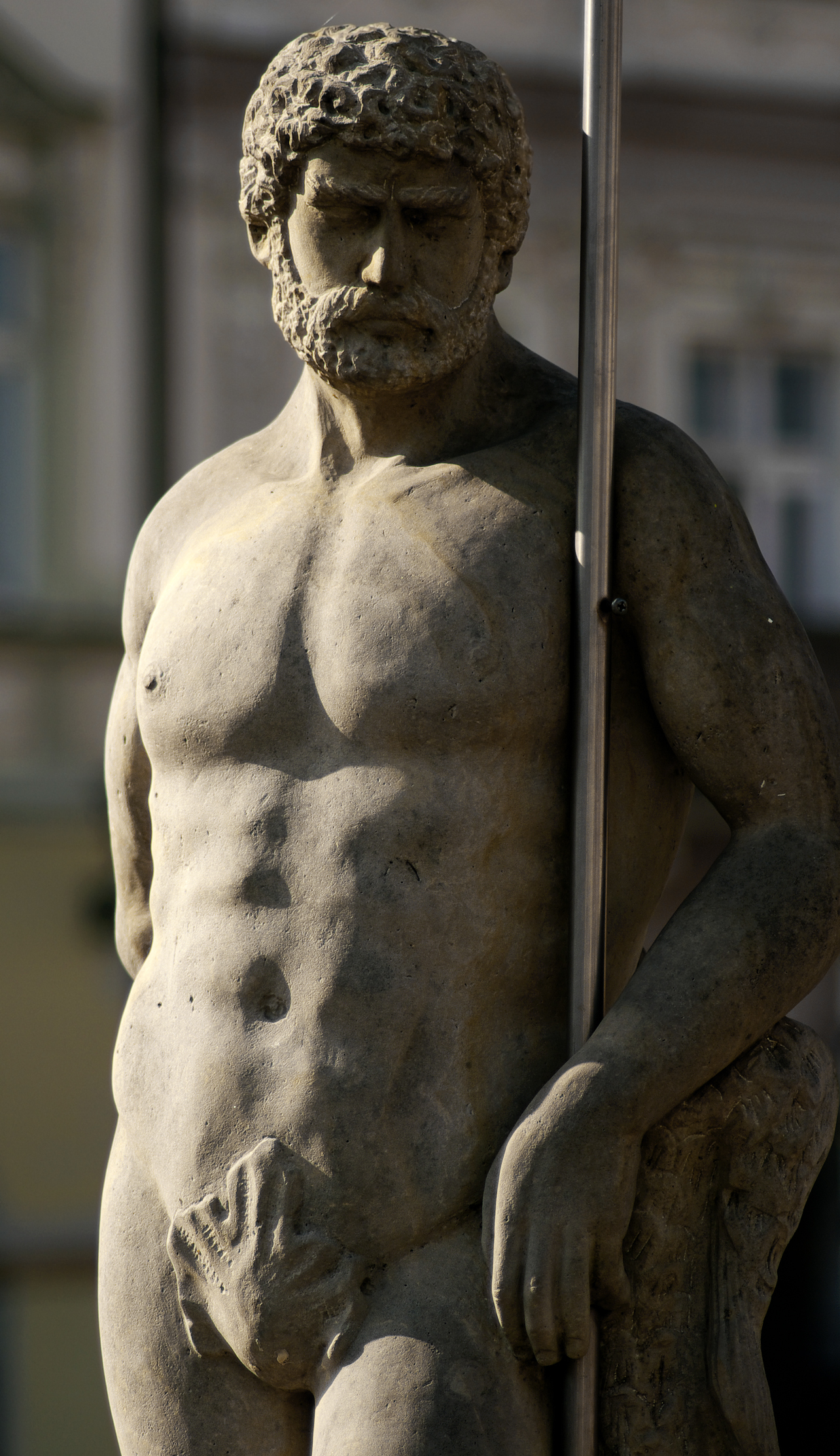 Bielsko-Biała Rynek - Fontanna boga Neptuna